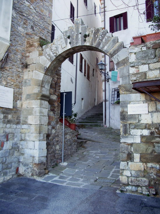 Porta Senese (lato esterno) lungo le Mura di Scarlino